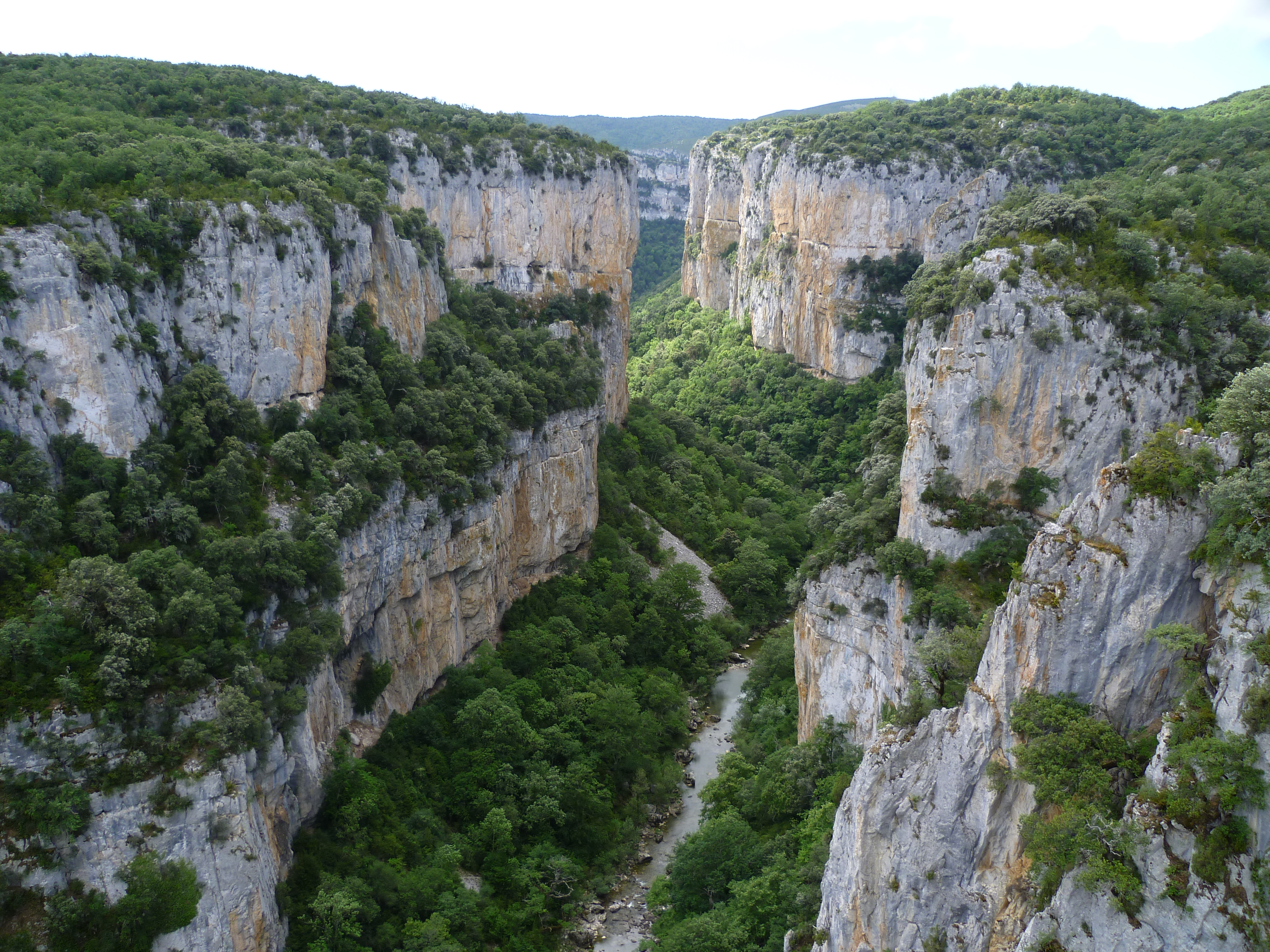 Sierra de Leire y Foz de Arbayún This is a photography of a Special Area of Conservation in Spain with the ID: ES0000125. Natura2000 entry, EEA entry